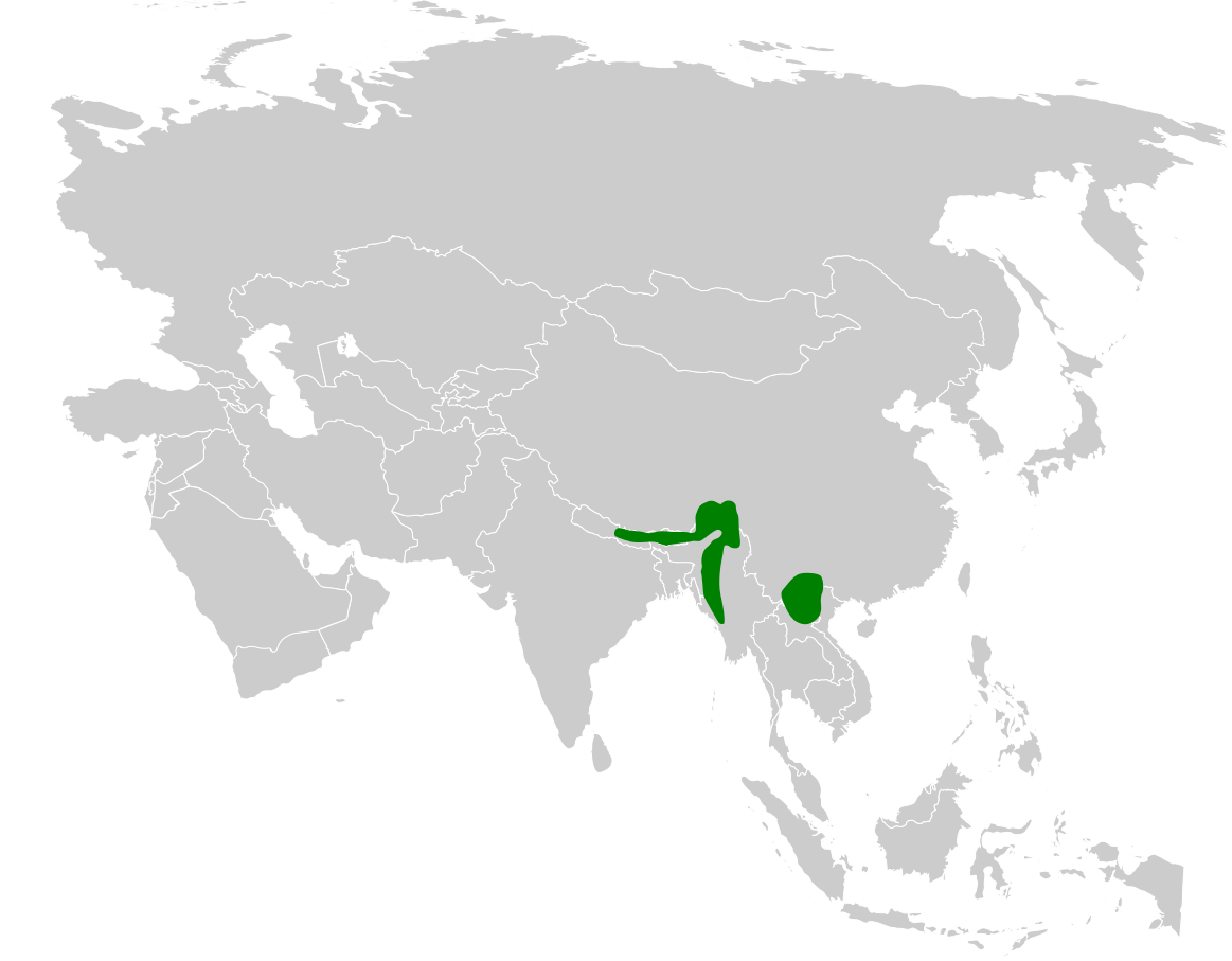 Tickellia hodgsoni distribution map, based on